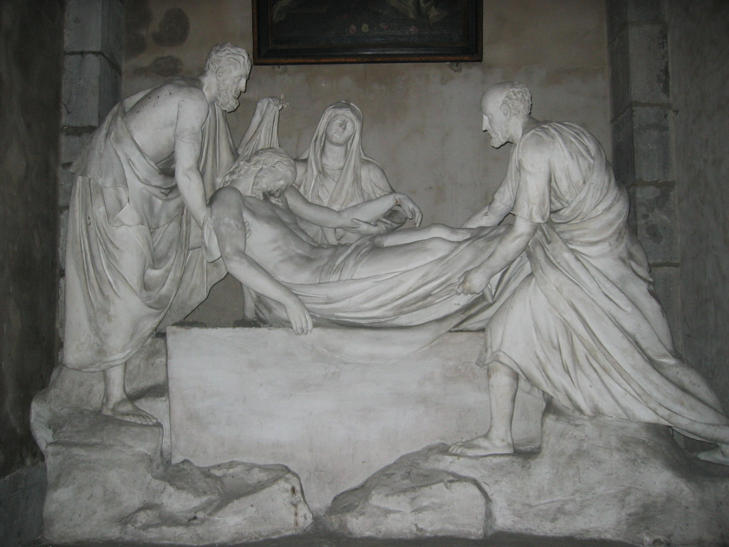 Sculpture biblique du sculpteur Auguste Clésinger à l'Église de la Madeleine de Besançon en Franche Comté - France